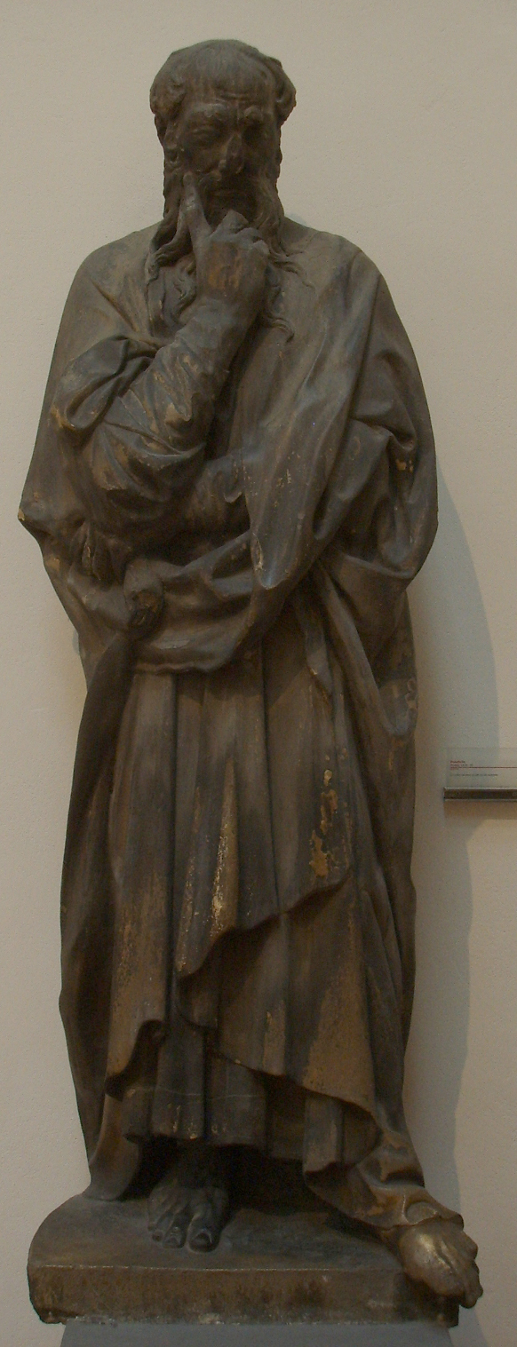 Opera del duomo (FI), donatello, profeta 1418-20